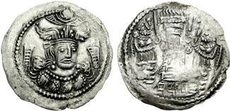 Dracma dum rei cidarita